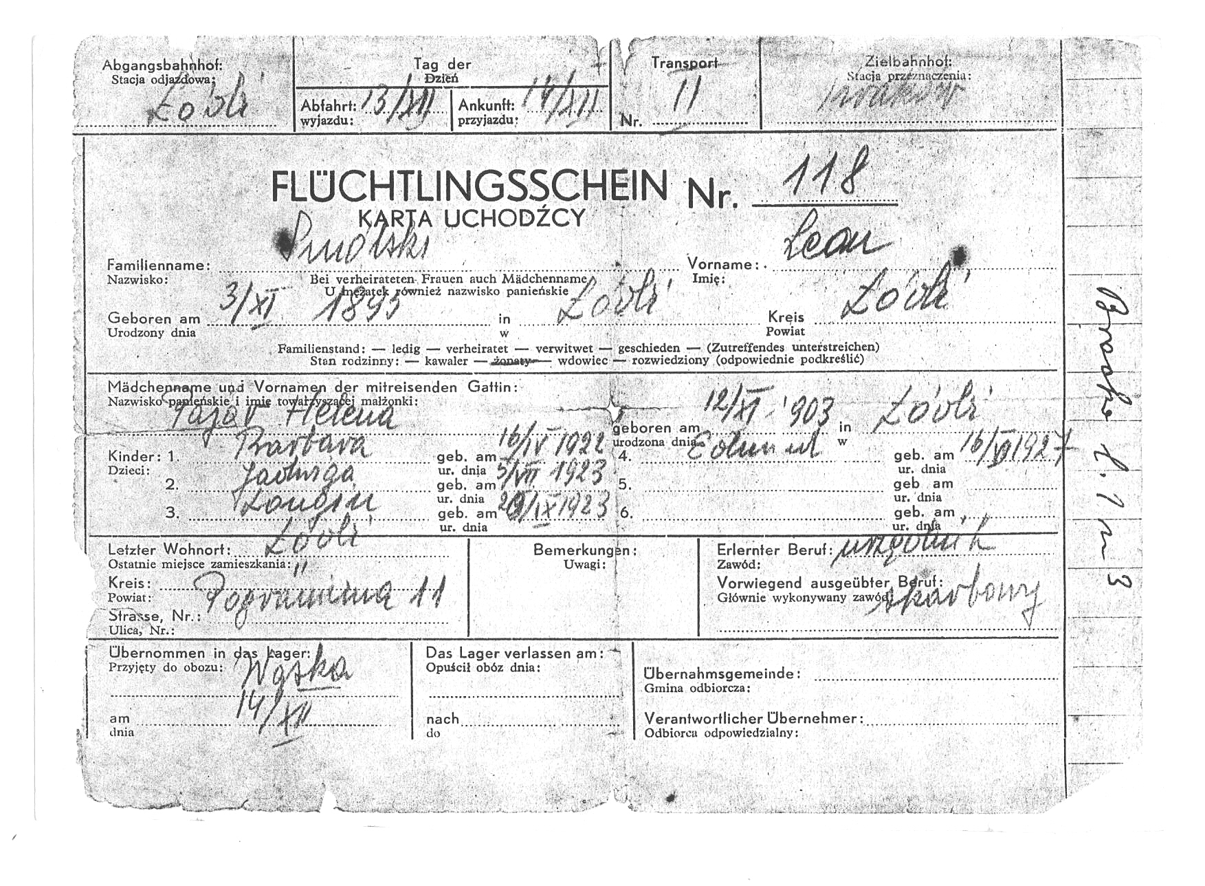 "Karta Uchodźcy" ( w rzeczywistości przymusowego przesiedleńca do Krakowa), łódzkiego urzędnika - Leona Smólskiego wraz z całą rodziną. Wywieziony z obozu przesiedleńczego na Radogoszczu w Łodzi w dn. 13 XII, w Krakowie 14 XII 1939, tu ulokowani w podobnym obozie przy ul. Wąskiej 7, na krakowskim "Kazimierzu". Zb. własne.